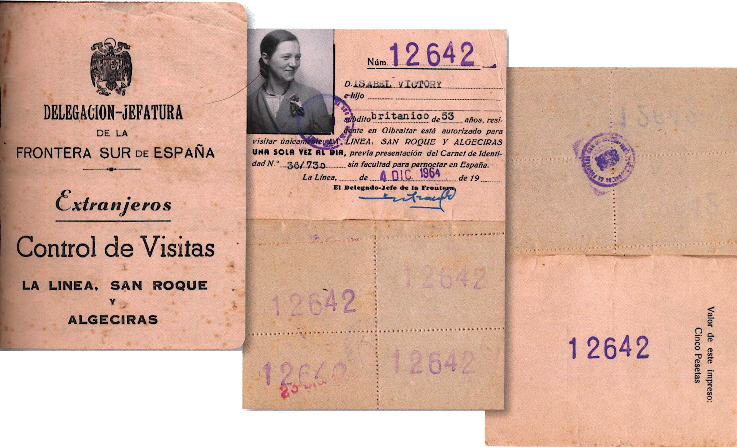 Spanischer Grenzgängerausweis für eine tägliche Einreise (ohne Übernachtung) für eine britische Bewohnerin Giraltars, 1964.